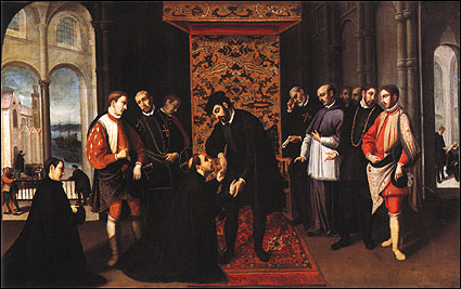 S. Francisco Xavier despedindo-se de D. João III antes da viagem para a Índia. O rei está ao centro, tomando as mãos do santo e, ao lado, encontra-se o Padre Simão Rodrigues, introdutor da Companhia de Jesus em Portugal. A receção decorre no Paço da Ribeira, vendo-se o Tejo ao fundo, e a corte é composta por membros do clero e da nobreza, incluindo membros das três ordens militares, identificadas pelas respetivas cruzes: Cristo, Santiago e Avis. D. João III tinha pedido missionários a Santo Inácio de Loyola para evangelização da Índia, que inicialmente designou Afonso de Bobadilha. Este adoeceu e a escolha veio a recair em São Francisco Xavier.